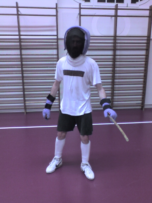 Tenue allégée de canne de combat.